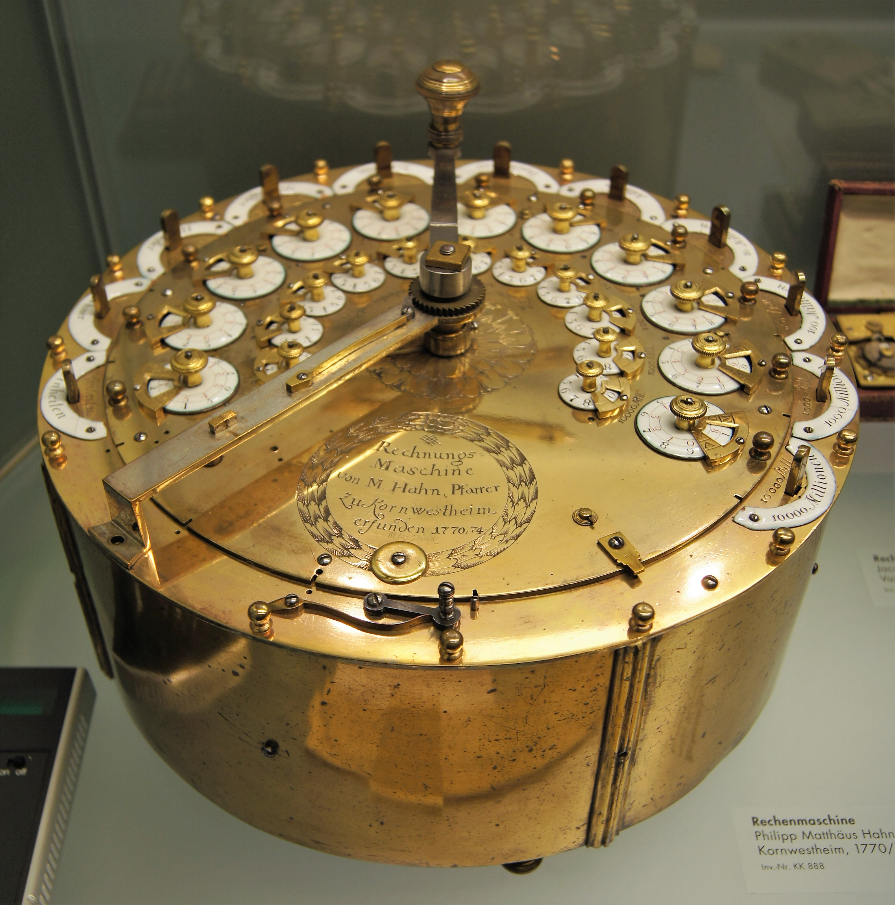 Rechenmaschine von Philipp Matthäus Hahn, Kornwestheim, 1770-1774